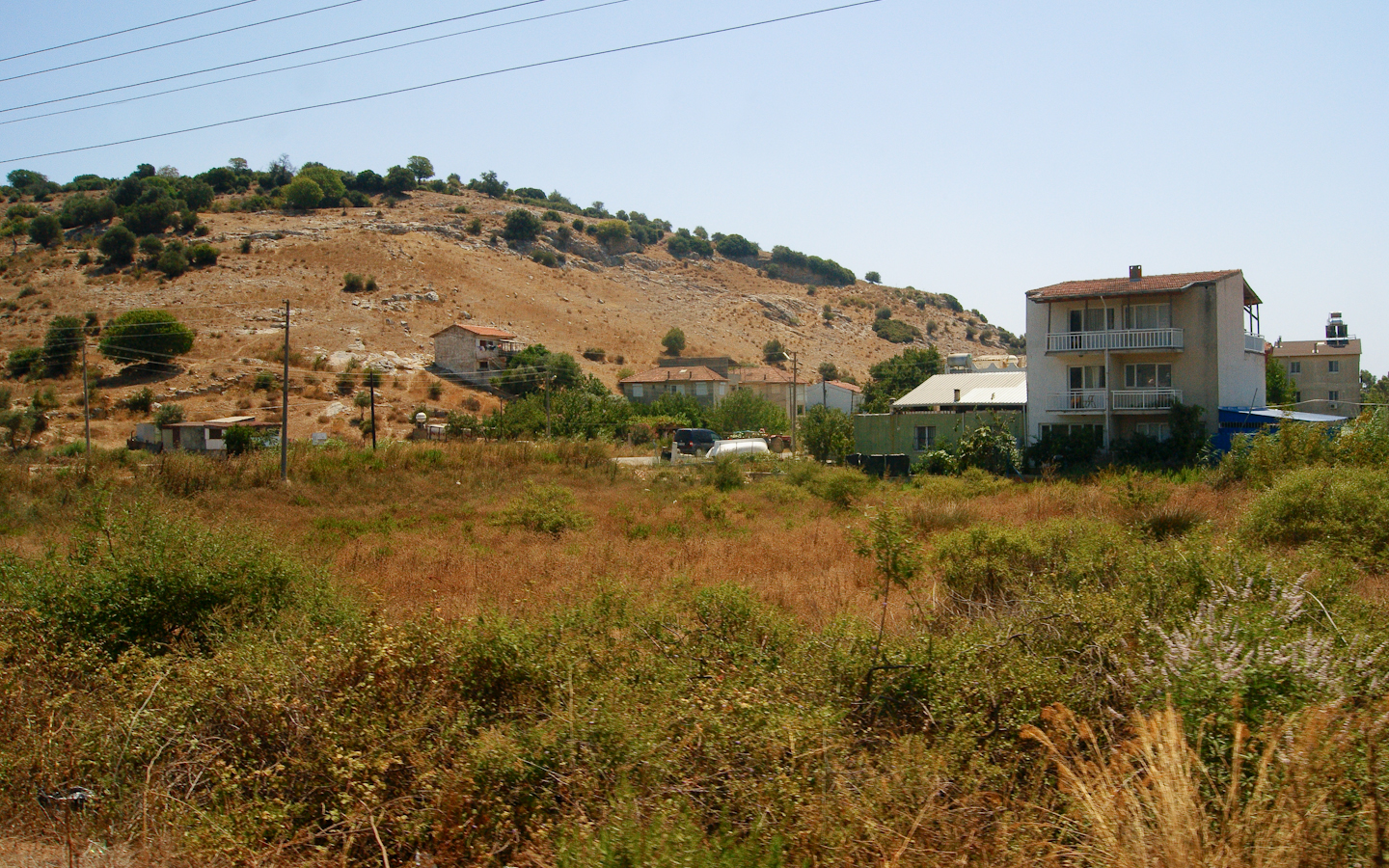 Izmir, Türkei